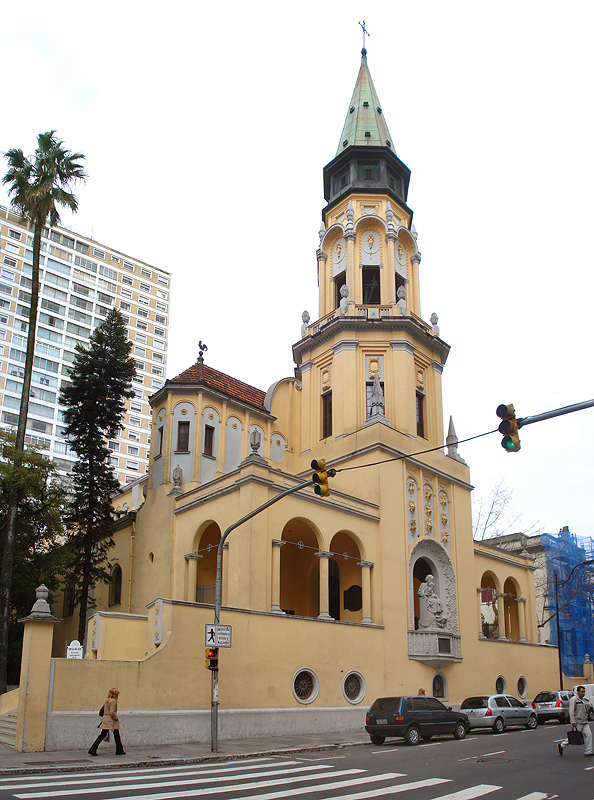 Interior da Igreja São José, Porto Alegre, Brasil.